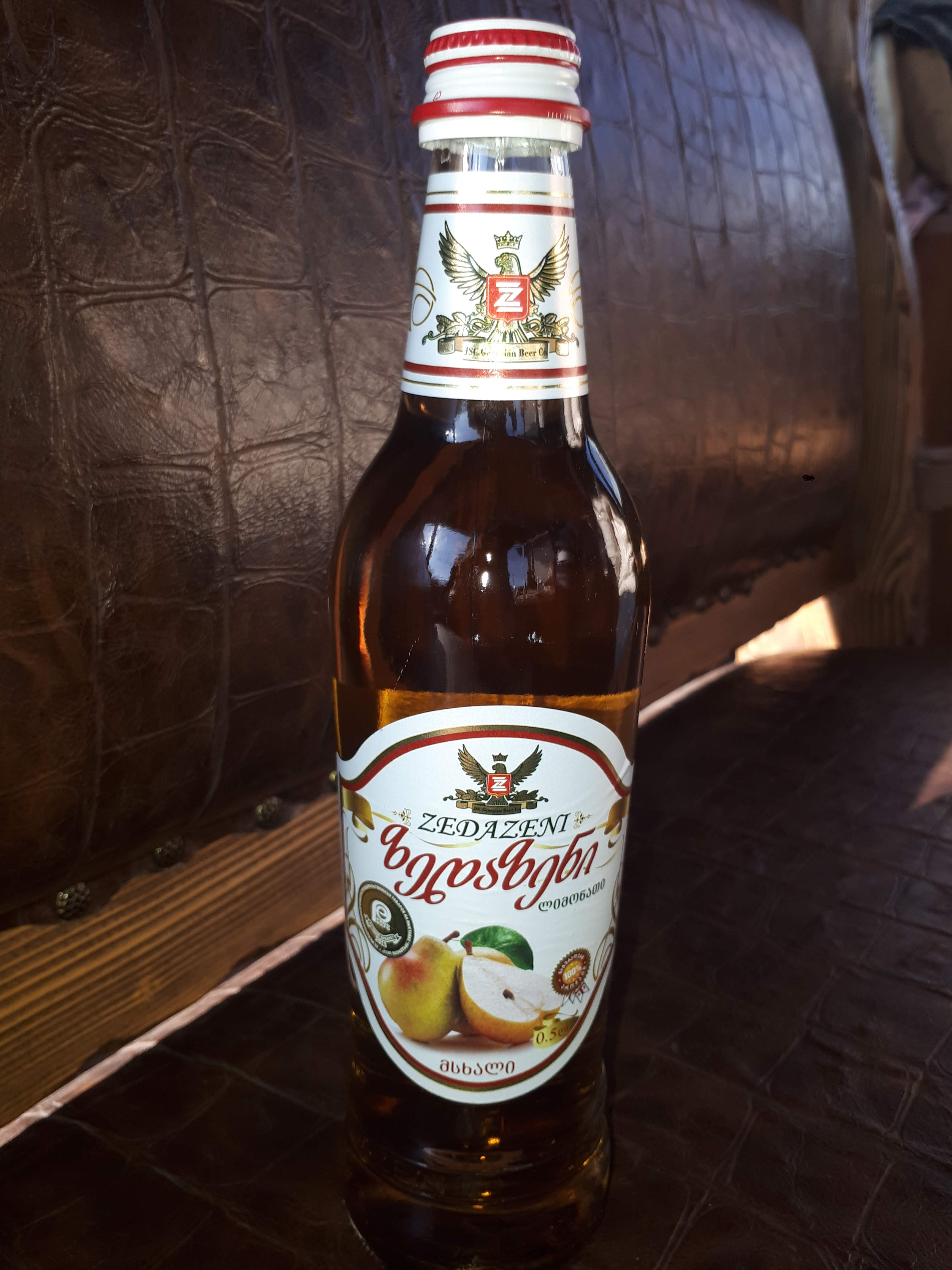 Грузинский дюшес лимонад